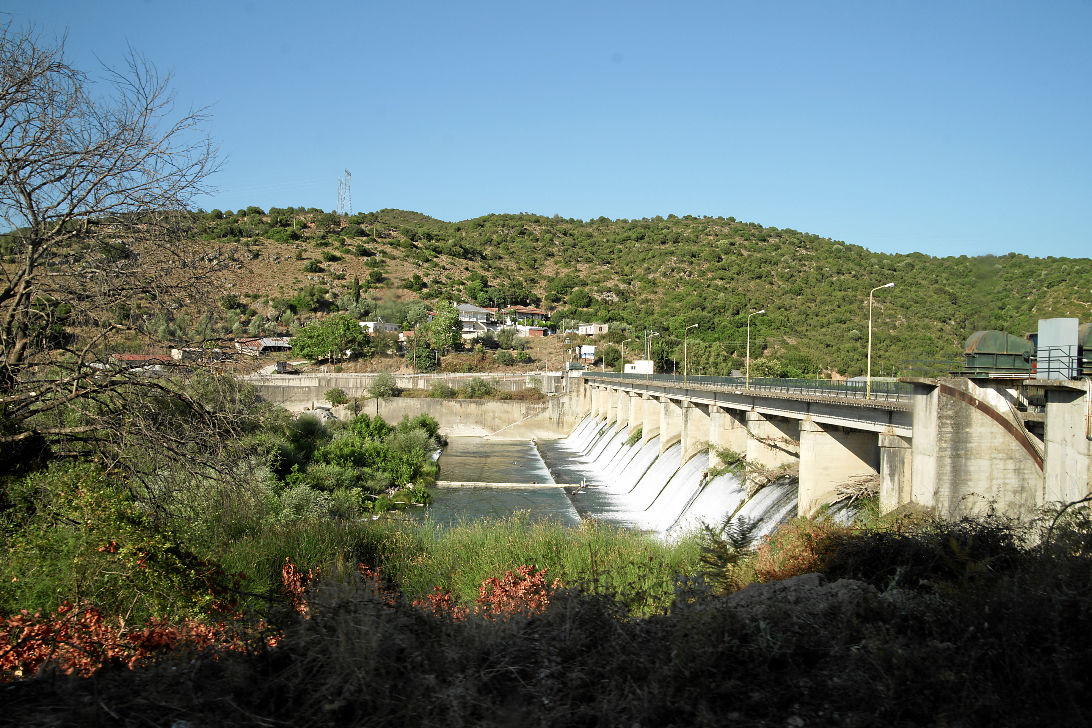 Staudamm am Kalamas / Thiamis